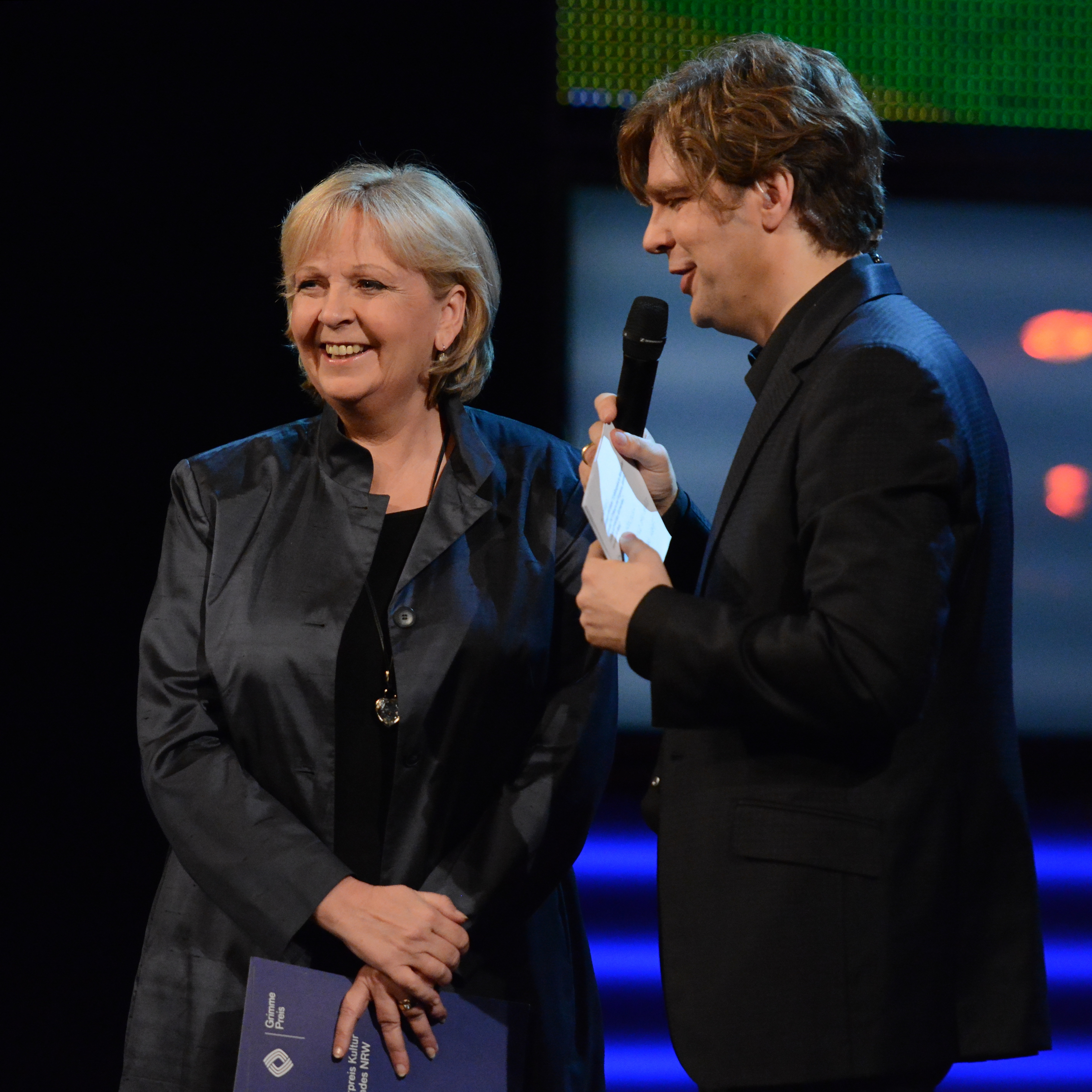 Hannelore Kraft mit Moderator Michael Steinbrecher bei der Verleihung des Grimme-Preises 2014.